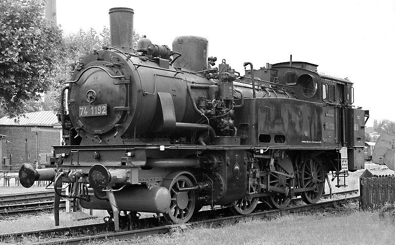 Preussische T12. Dampflokomotive 74 1192 im Eisenbahnmuseum Bochum-Dahlhausen.